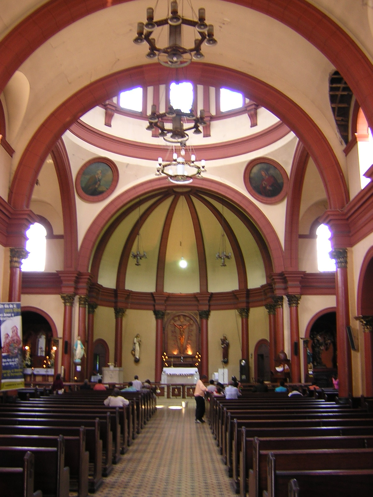 Iglesia de San Antonio. Medellín, Colombia.